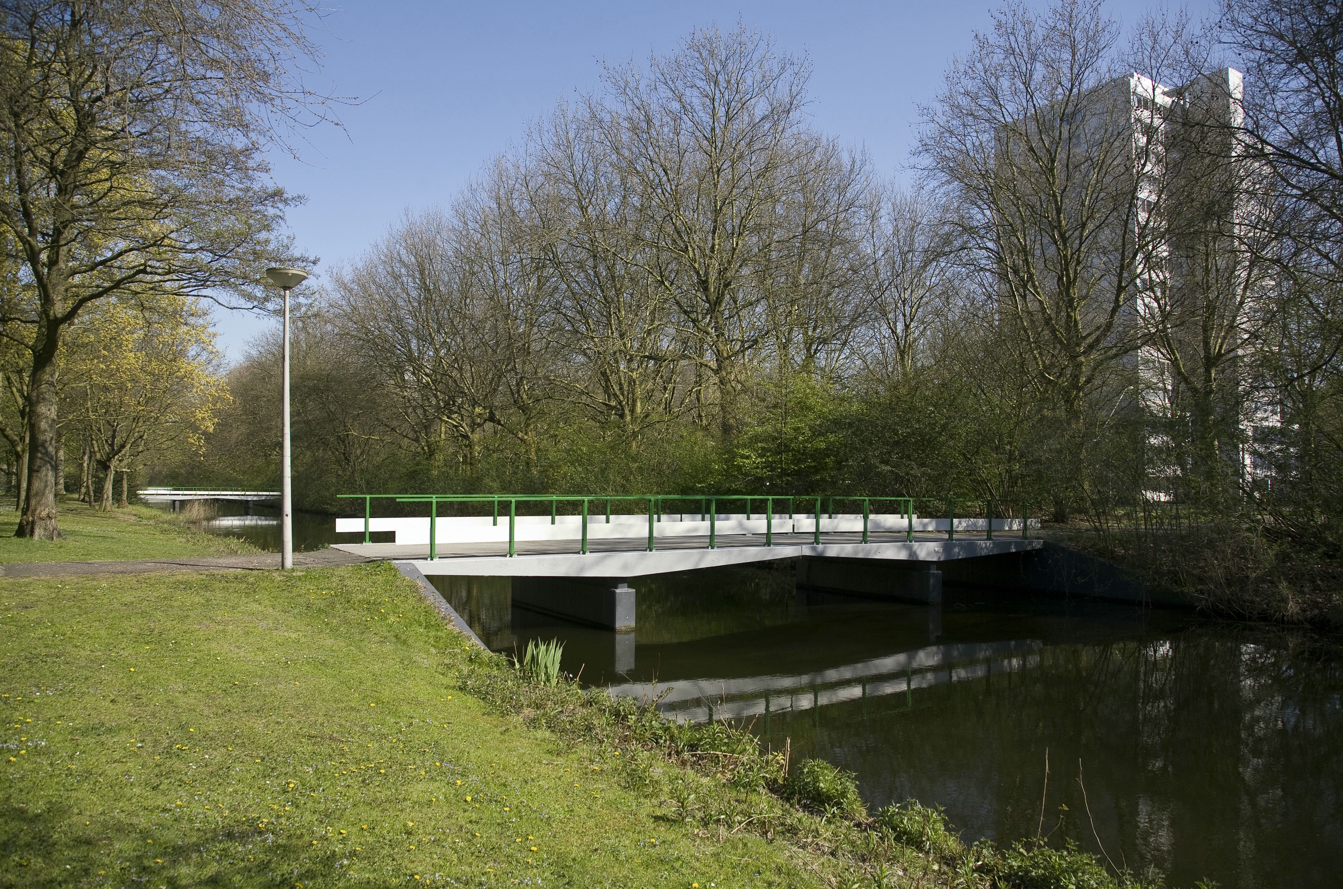 Gijsbrecht van Aemstelpark: Zicht op voetgangersbrug over waterpartij in park; Brug 830 vlak voor de flat Teilingen